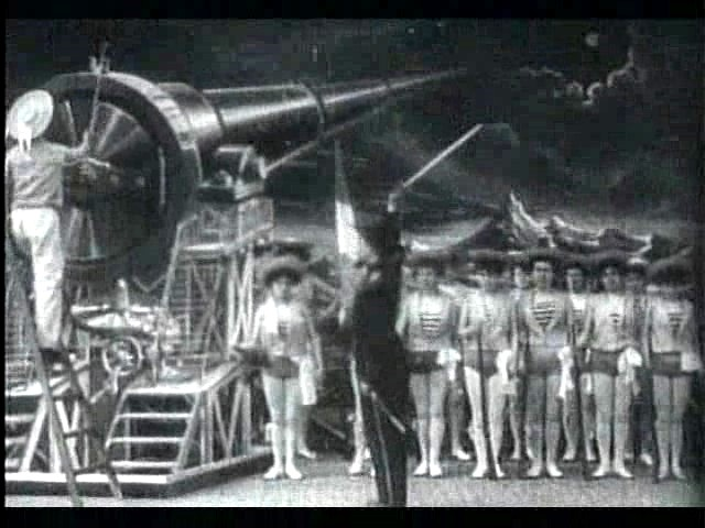 Méliès, viaggio nella luna (1902) 05